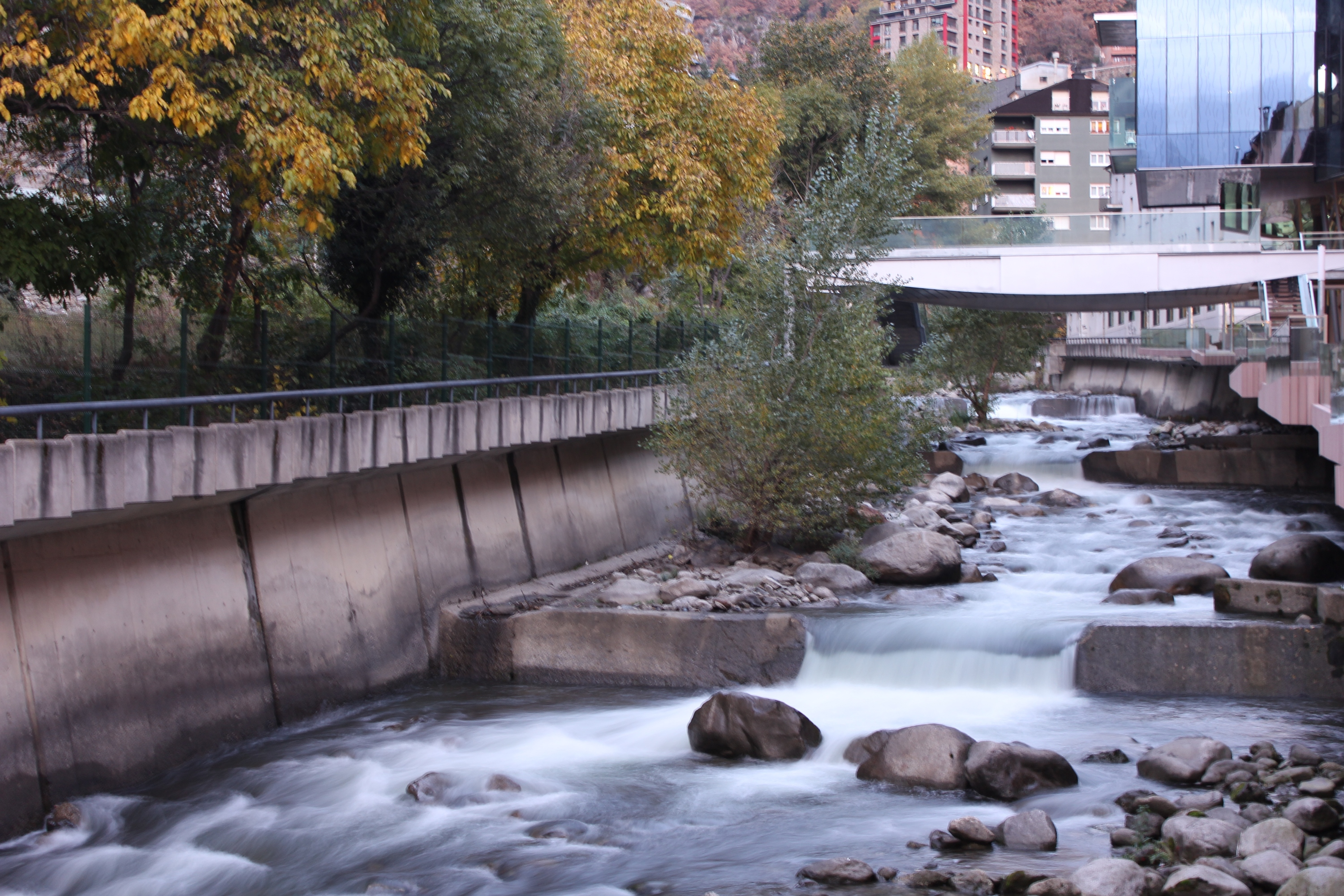 Riu Valira d'Orient This is a a photo of a river in Andorra with id: IEA-R-2